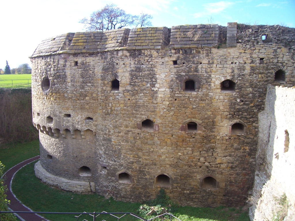 Беларуская (тарашкевіца): Рандэль XVI ст. у Квэрфурце (Нямеччына)